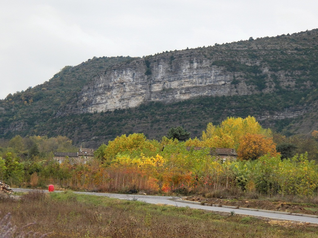 Falaises dans les gorges de la Beaume près de Rosières (Ardèche)